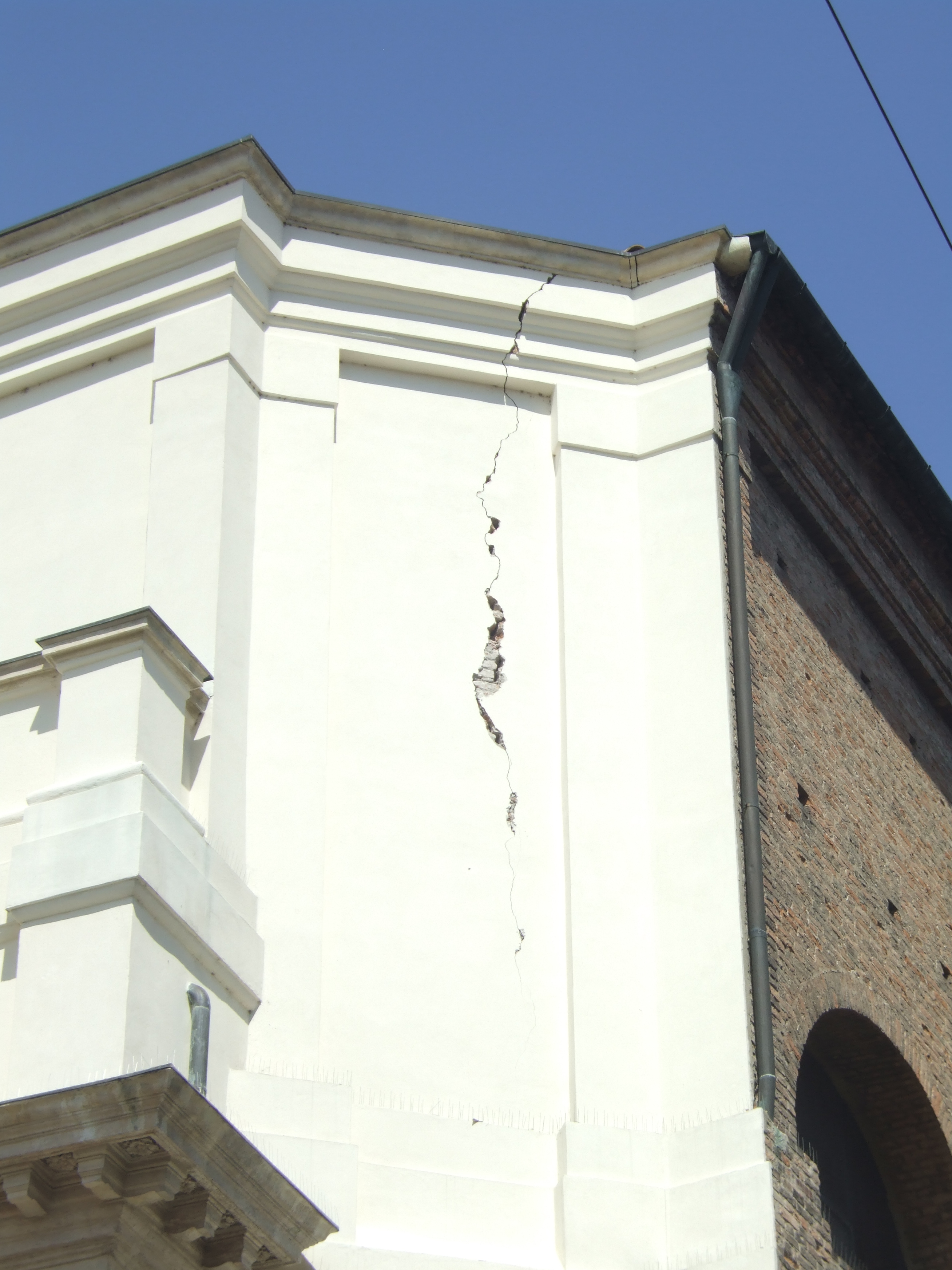 Padova - Chiesa di Santa Lucia - Crepa